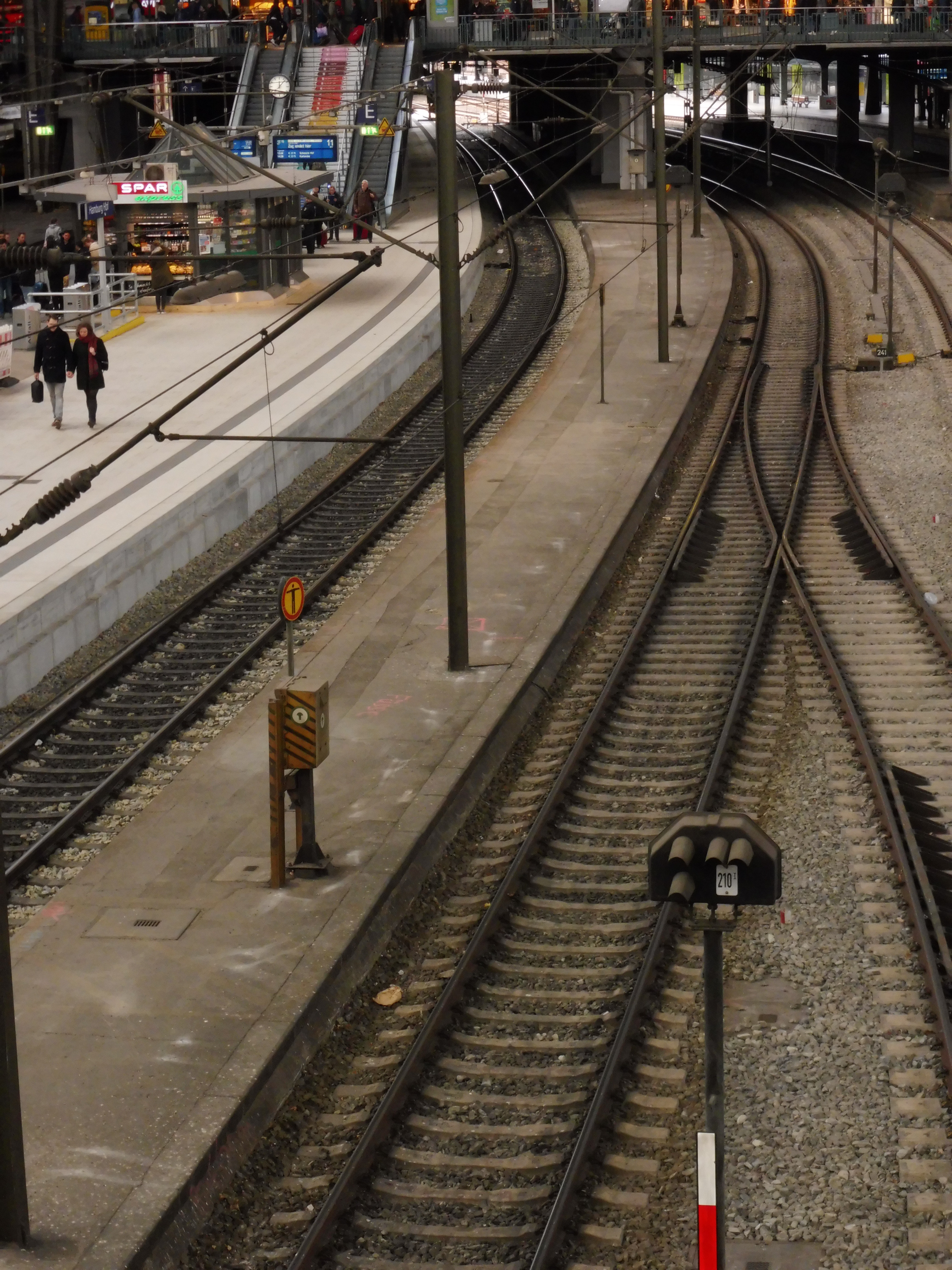 Zwischenbahnsteig in Hamburg Hauptbahnhof